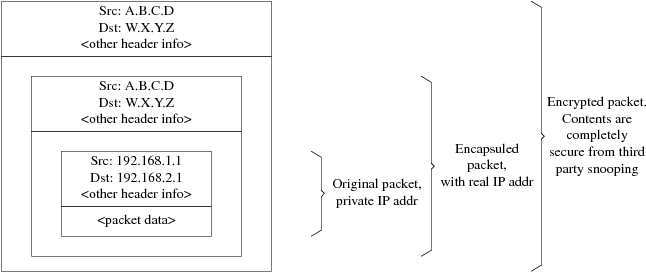 Монгол: Ipsec-crypt-pkt